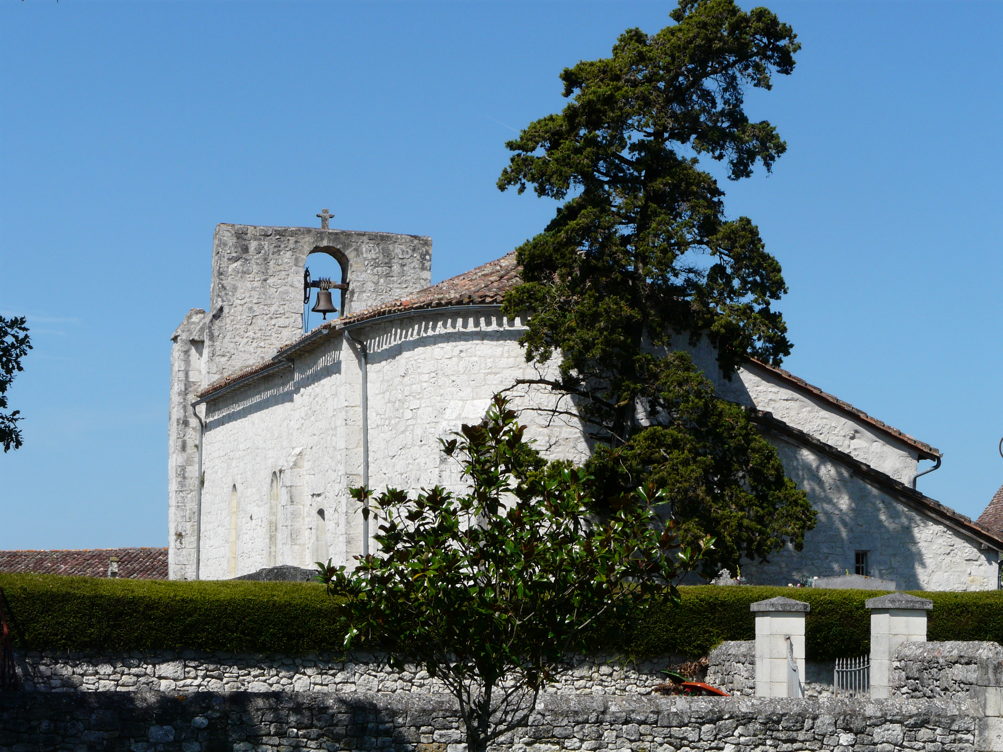 Le chevet de l'église Saint-Blaise de Bardou, Dordogne, France.